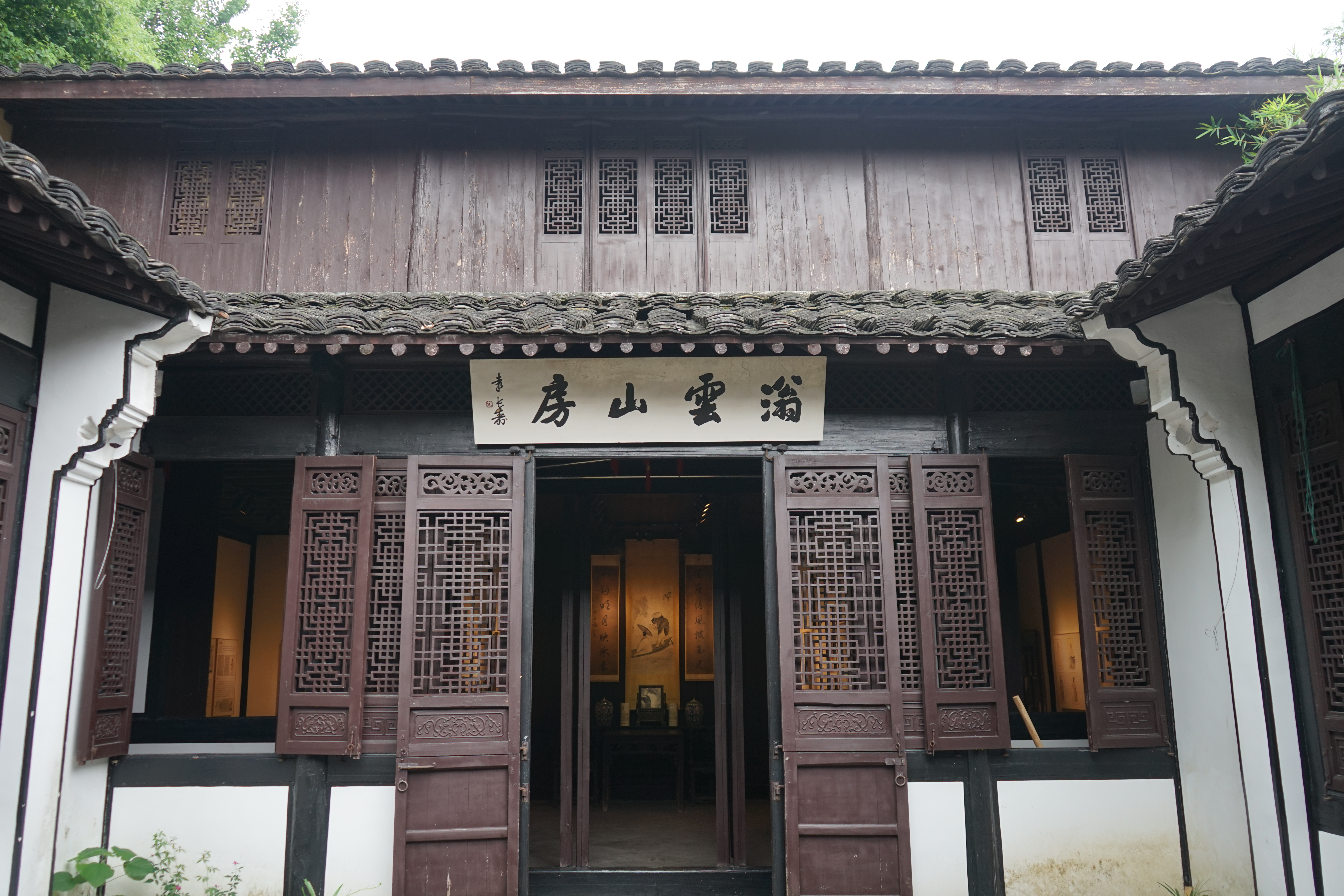 章学诚故居·会客厅（小堂前）